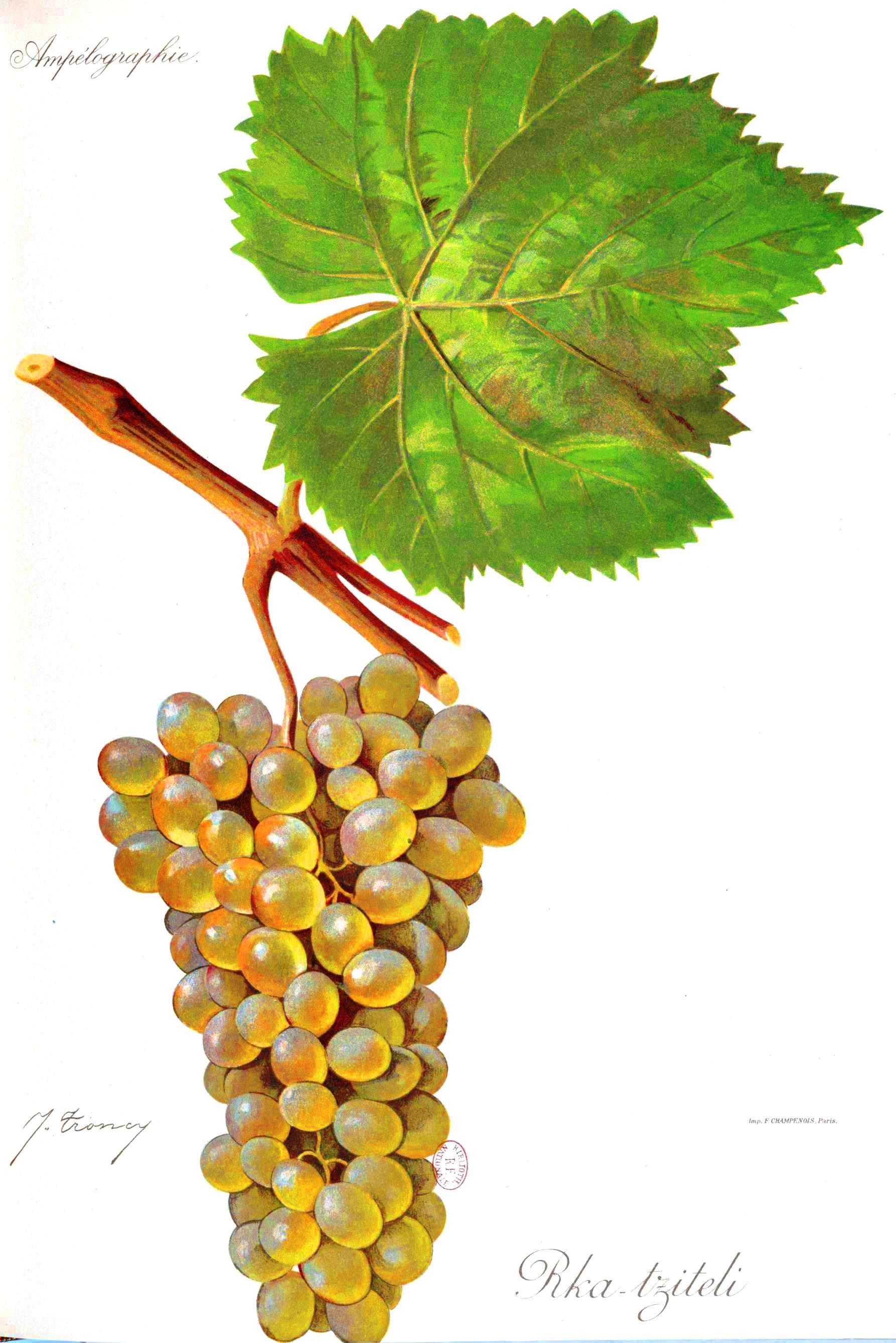 Rka-tziteli. Ampélographie : traité général de viticulture. Tome 4 / publié sous la direction de P. Viala,..., V. Vermorel,... ; avec la collaboration de A. Bacon, A. Barbier, A. Berget... [et al.]. Bibliothèque nationale de France L'Ampélographie Viala et Vermorel est entrée dans le domaine public depuis le 11 février 2011. Viala, le dernier ayant droit, est décédé le 11 février 1936, son co-auteur Vermorel, en 1926, les illustrateurs Alexis Kreder, en 1912 et Jules Troncy, en 1915. Il en résulte donc que 500 planches de cépages sont désormais utilisables sur Commons étant libres de droits.